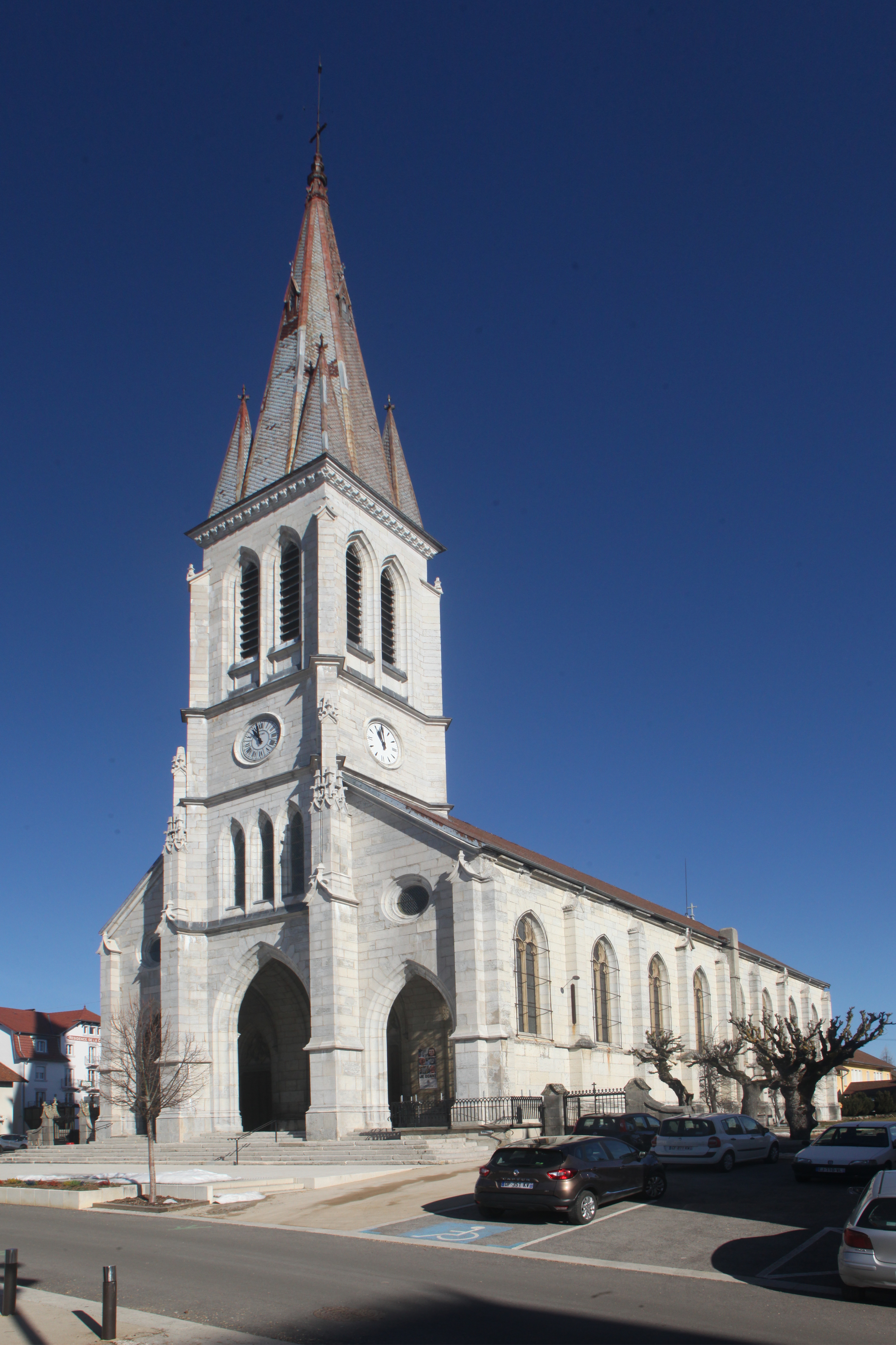 Eglise du Russey.